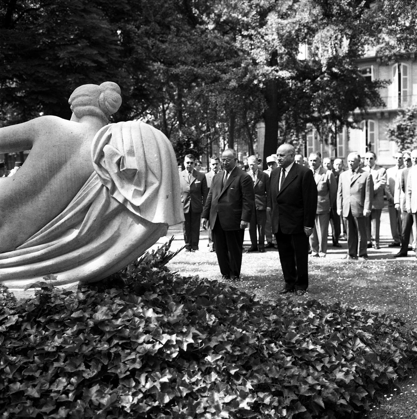 Jardin Royal, devant la statue "A la gloire des équipages pionniers de la ligne France-Amérique". 20 juin 1961. Vue d'ensemble des personnalités venues assister à une cérémonie d'hommage à la mémoire des pionniers de l'aviation : au 1er plan une partie de la statue (buste) vue de derrière ; au 2nd plan M. Nadal (à gauche) et Didier Daurat se recueillant devant la statue ; en arrière-plan autres personnalités. Observation: Statue d'Aristide Maillol réalisée en 1938-1939, mise en place à l'entrée du Jardin Royal en 1948. Aujourd'hui elle est remplacée par une sculpture moderne.